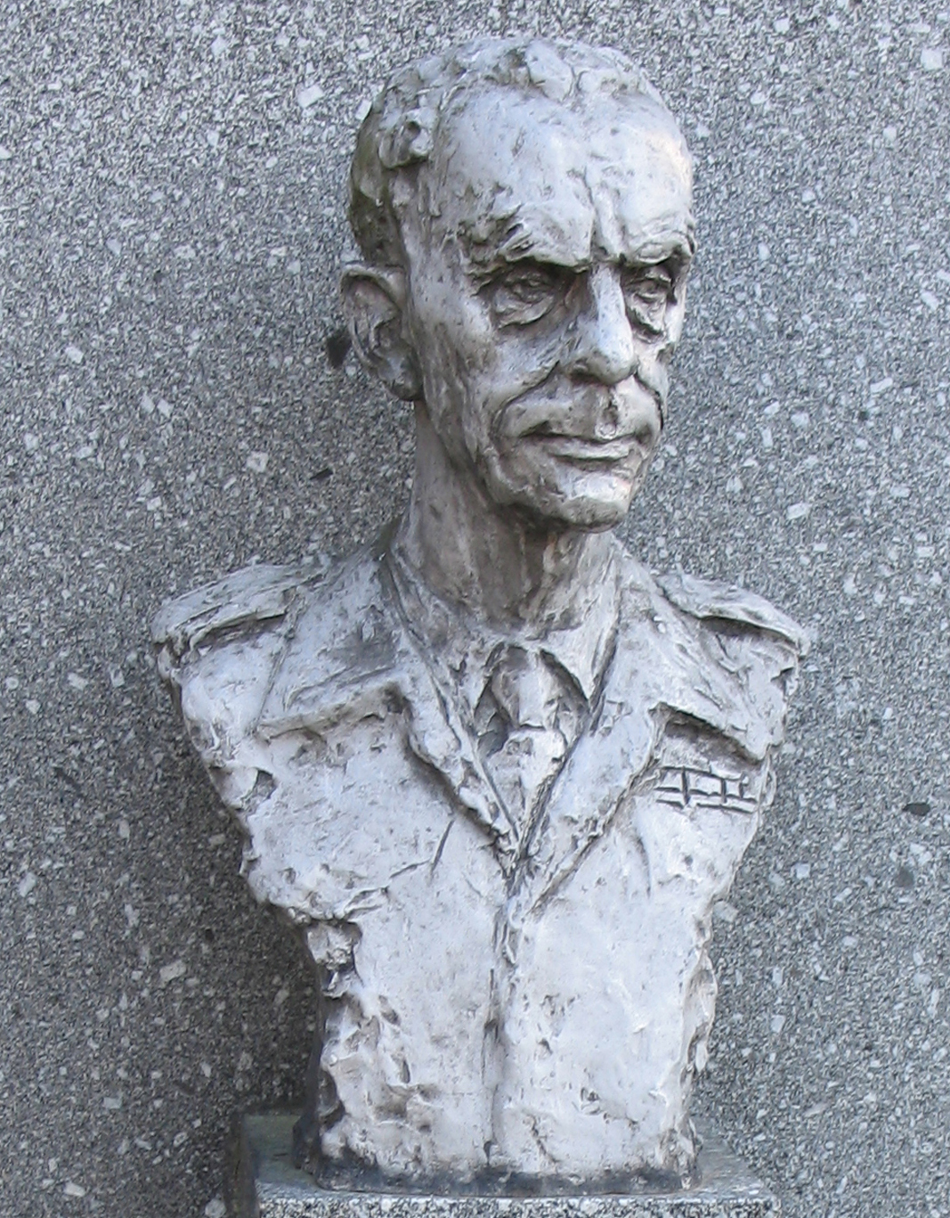 Dukla, Alej hrdinov armádny generál Karel Klapálek